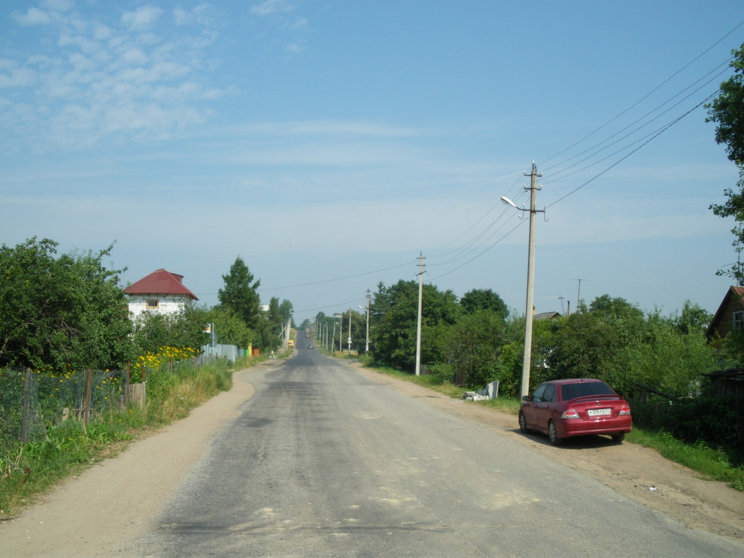 Россия, Ленинградская область, Ломоносовский район, деревня Низино, Центральная улица, у дома 1А. Дата съёмки - 27 июля 2010 г. Автор - Роговиков Николай.